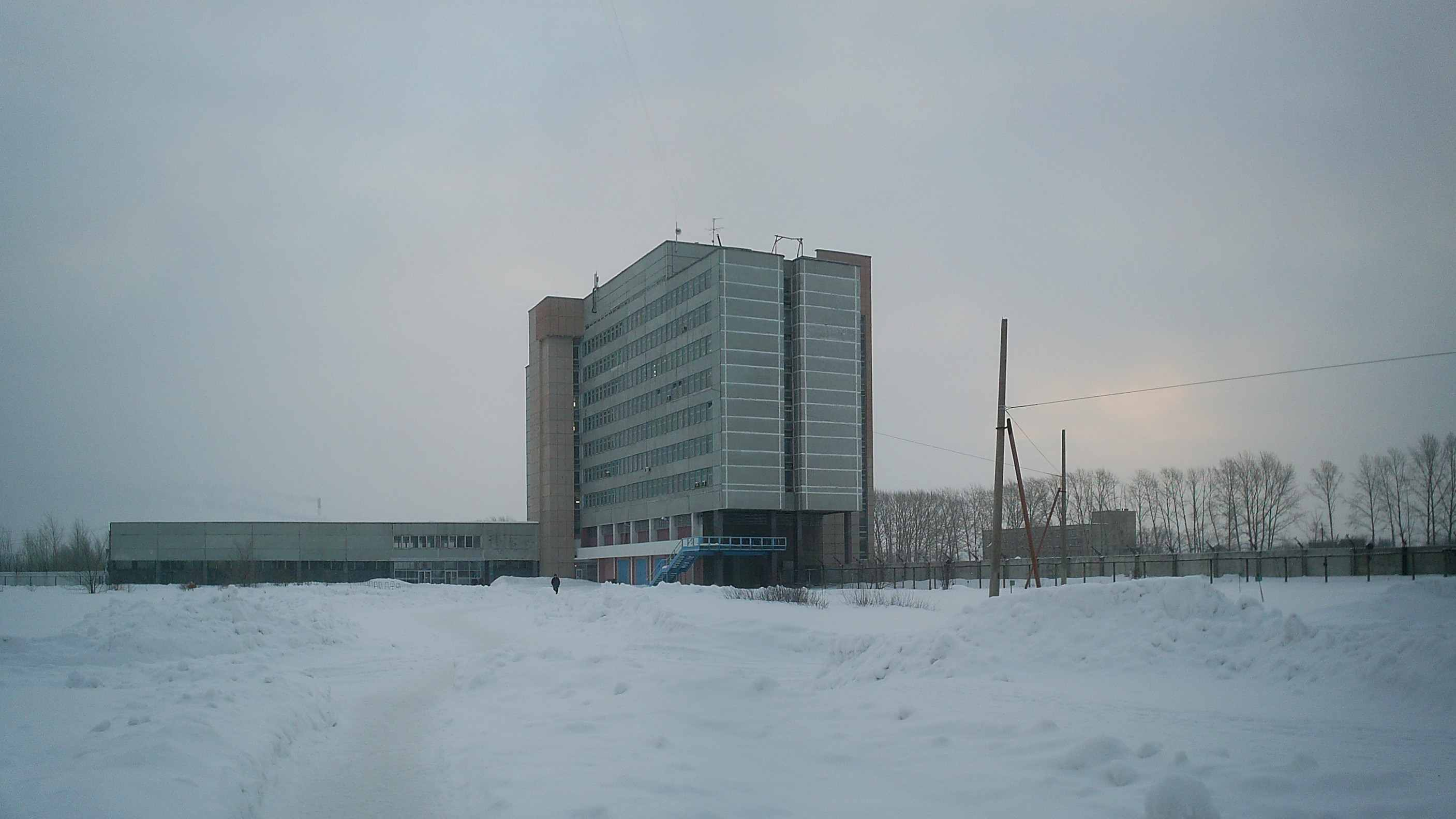 Здание "МК Витязь" 4.02.2011